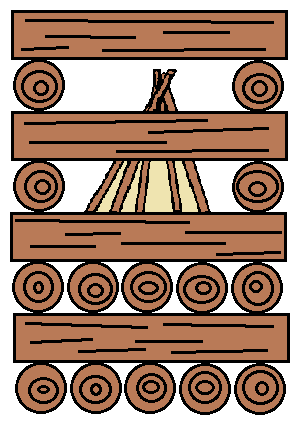 Skisse av et pagodebål